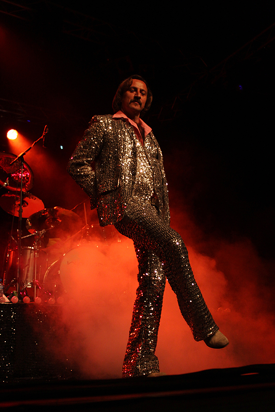 Dieter Thomas Kuhn tänze auf dem festival Paaspop, Schijndel, den Niederlanden, 23-04-2011